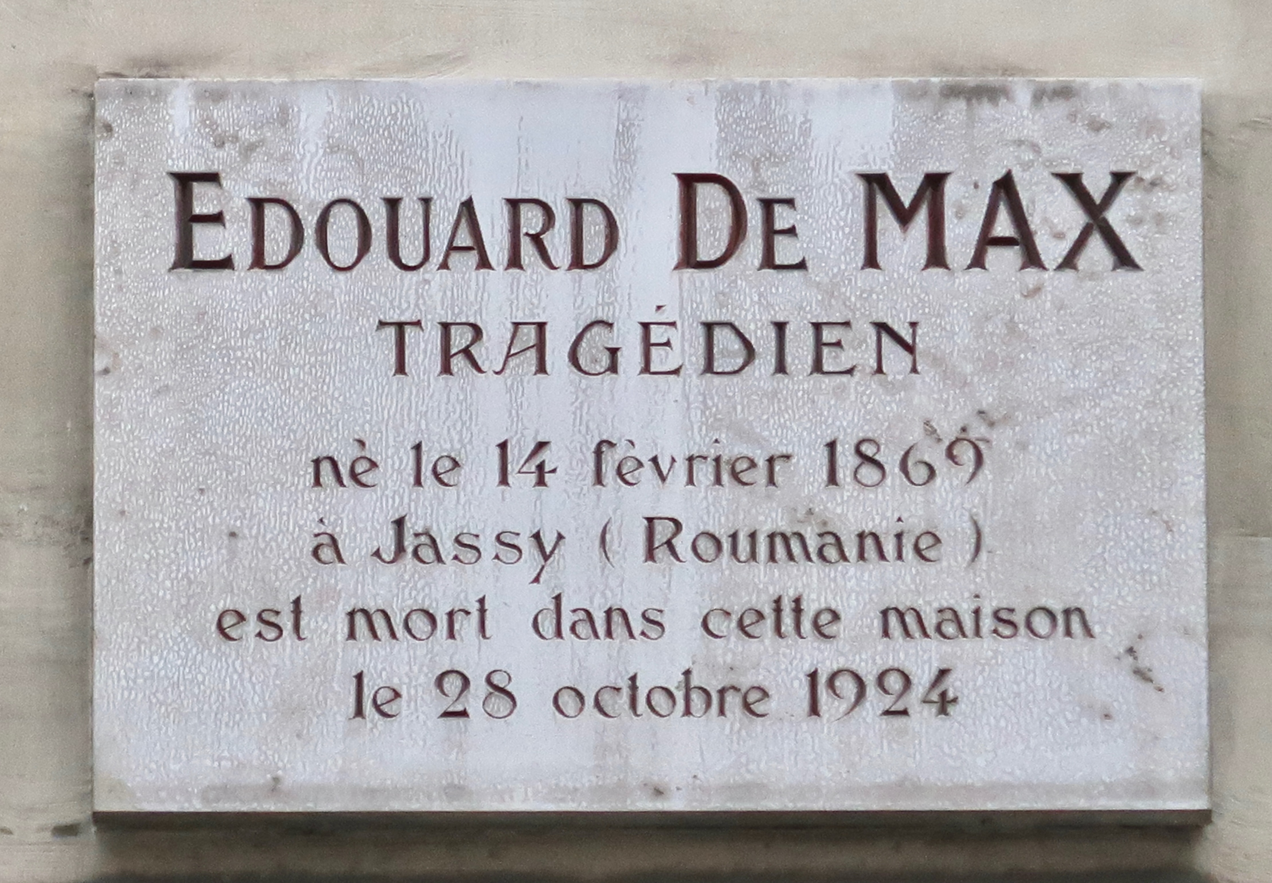 Plaque en hommage à Édouard de Max, 66 rue de Caumartin (Paris, 9e).